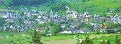 Blick auf Usseln vom Kahlen Pön 774 Meter üNN